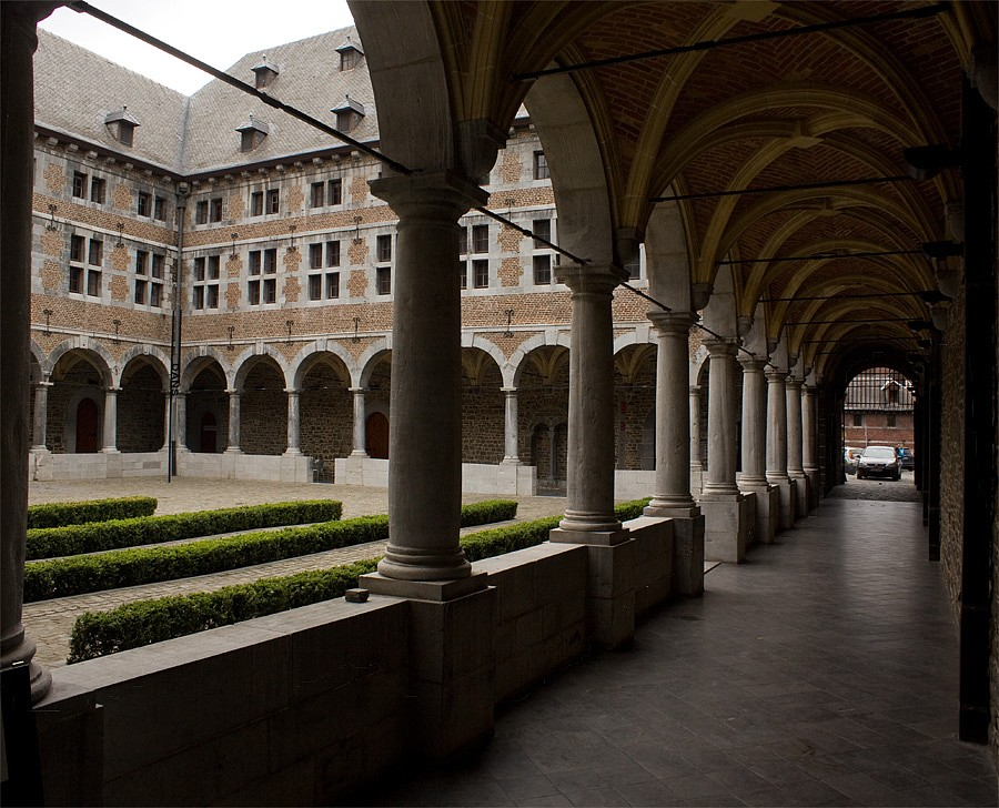 Gebouwen van het klooster van de Minderbroeders, tegenwoordig Musée de la Vie wallonne